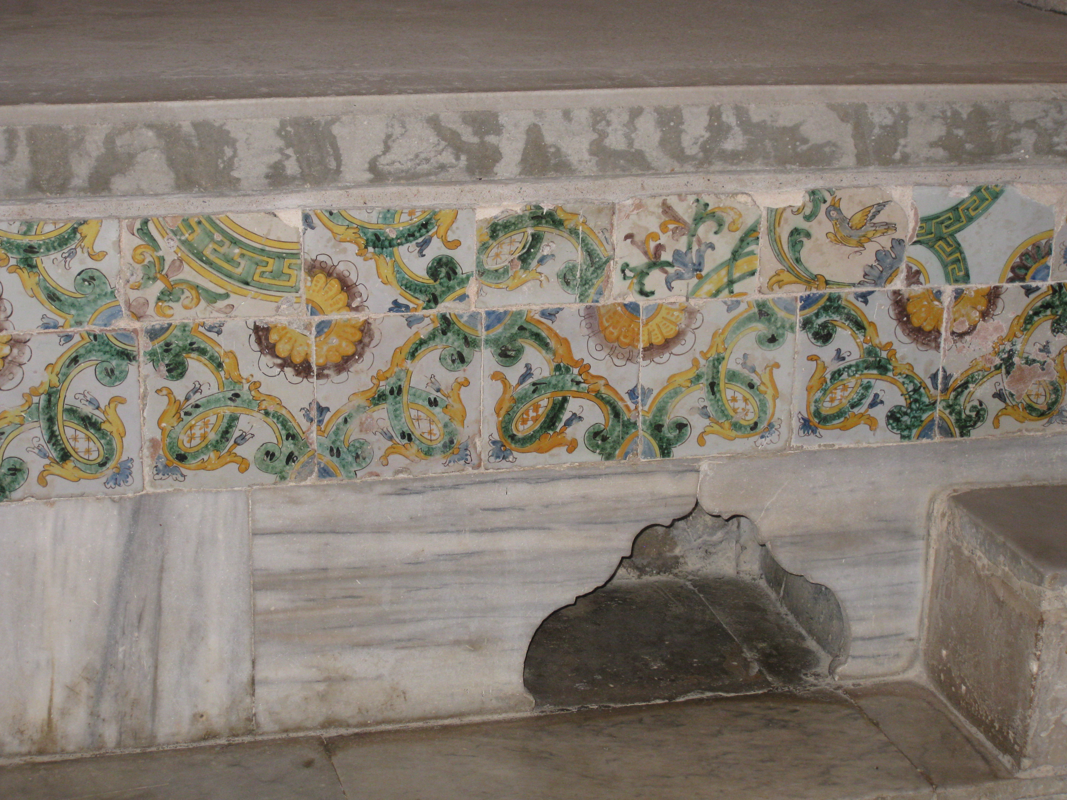 Acco (Acre, Akko) - Hamam el Basha (Hamam el Pasha) עכו חמאם אל באשה (חמאם אל פאשה) - בית המרחץ התורכי